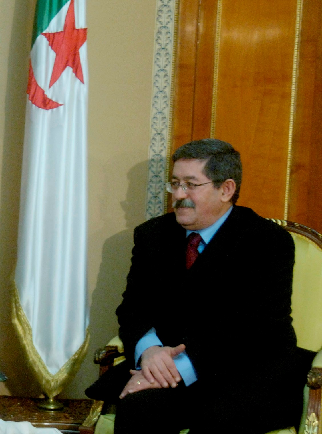 Algerian Prime Minister Ahmed Ouyahia in Algiers, Algeria, on Feb. 12, 2006.